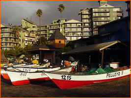 Papudo, Litoral Central de Chile.